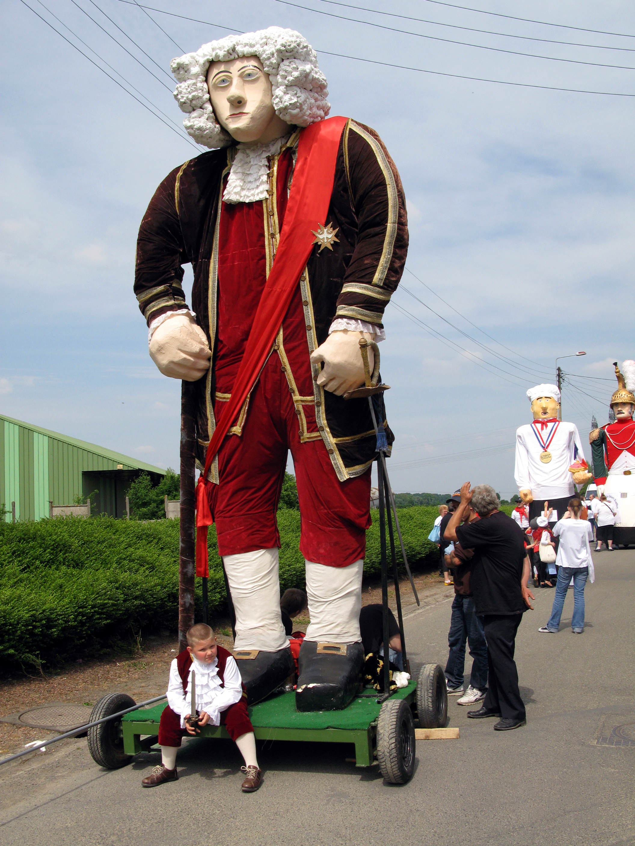 Guesnain (Nord, France) - Animation festive au centre-ville, un dimanche de printemps. Dans la rue Francisco Ferrer (à proximité immédiate de la Mairie, derrière l'ancienne brasserie), les géants attendent avec leurs accompagnateurs le départ de la parade. On voit ici Dupleix, Eric le Pâtissier, Scalfort. .